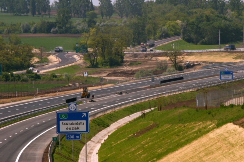 A 25-ös csomópont Százhalombattánál (M6-os autópálya)